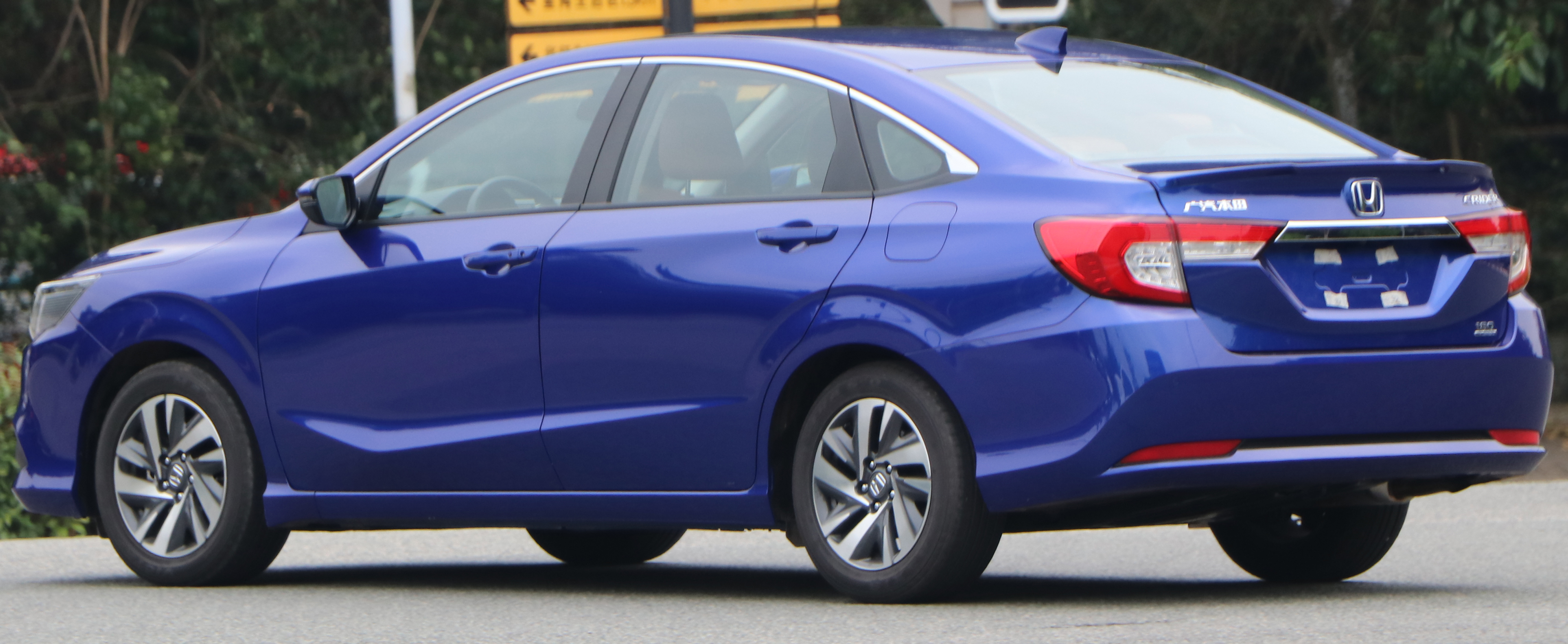 广汽本田凌派